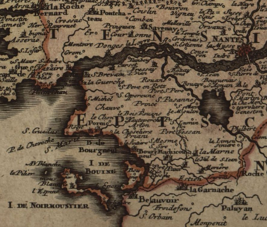 Détail extrait de la Tabula ducatus britanniae gallis. Le gouvernement général de Bretagne in suos novem episcopatus omnes Turonensi Aurel et centré sur le pays de Retz (sud-ouest de Nantes).